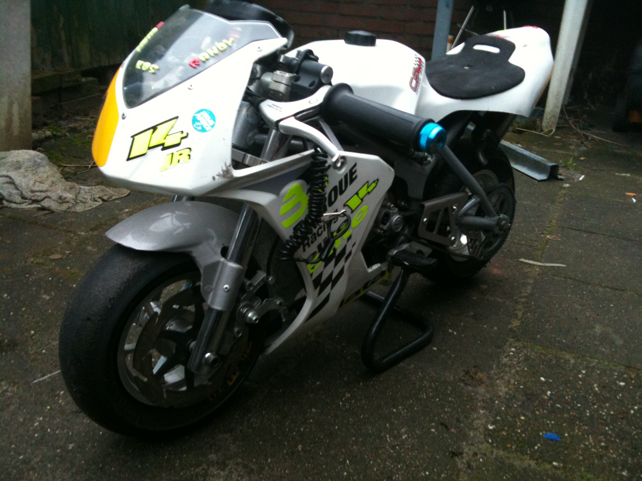 Nedersaksies: De minibike van Randy Kos met ongeveer Getest